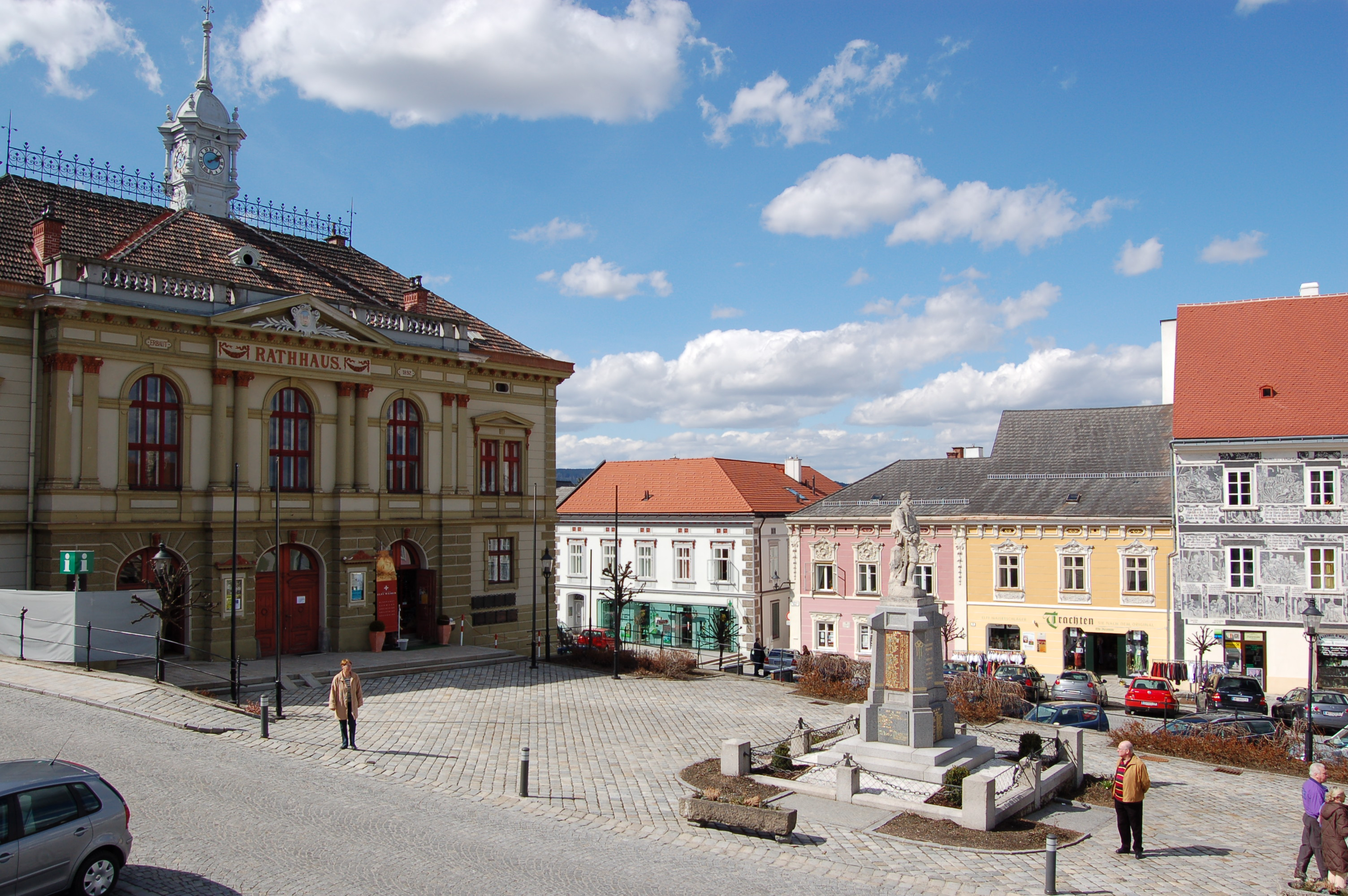 Das Rathaus in Weitra am Rathausplatz. Kriegerdenkmal.